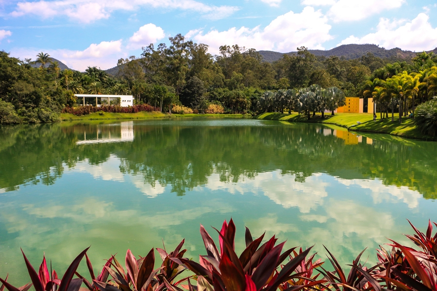 Instituto Inhotim é uma Reserva Particular de Patrimônio Natural. Possui um dos mais relevantes acervos de arte contemporânea do mundo e uma coleção botânica que reúne espécies raras e de todos os continentes.